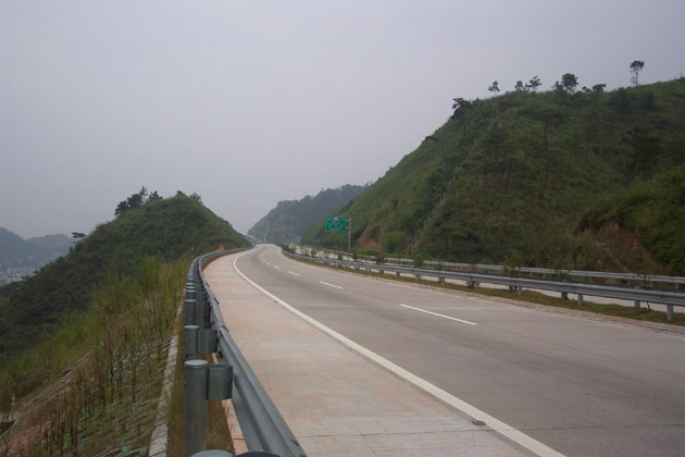 河梅高速公路